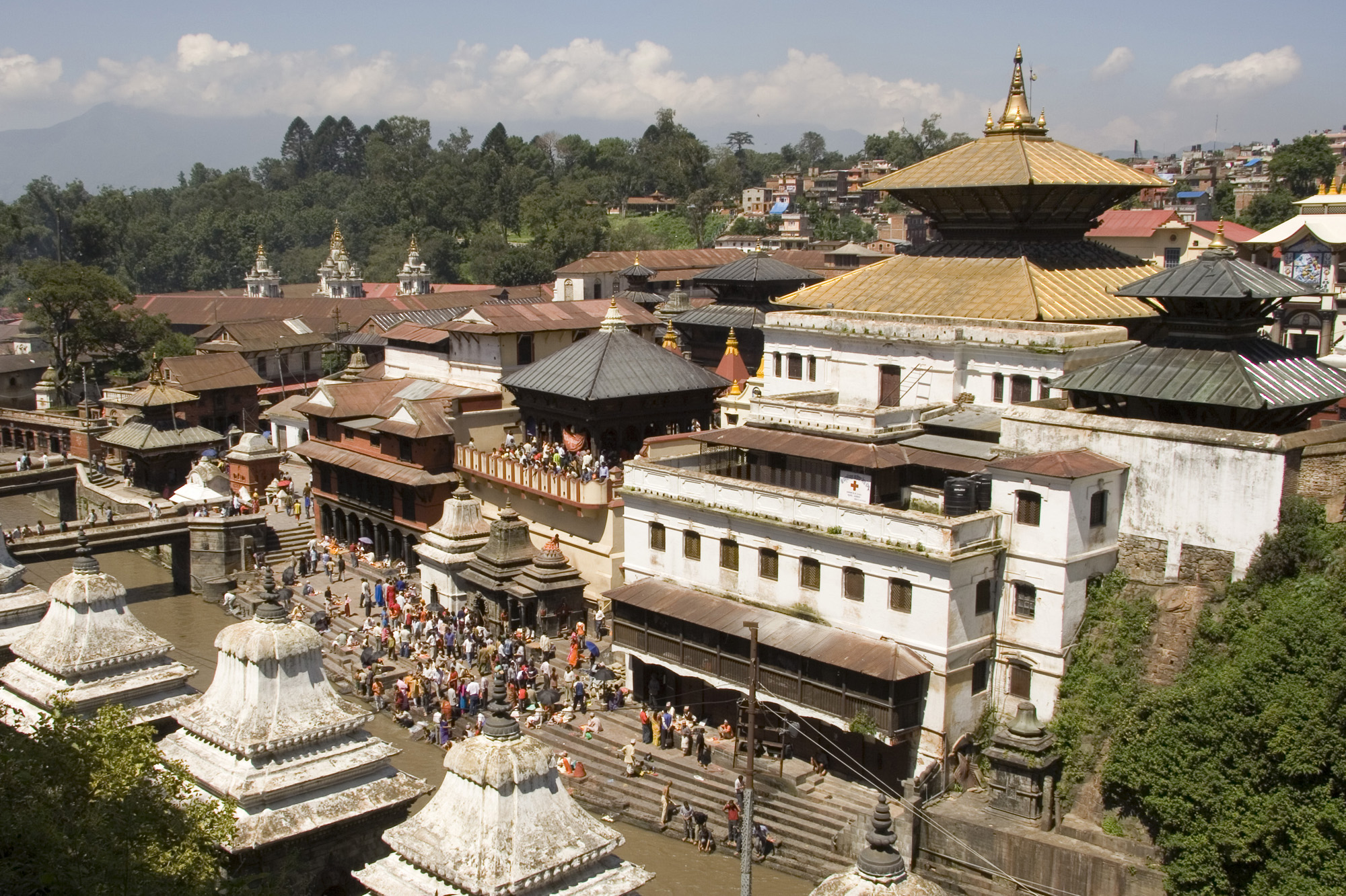 Pashupatinath temple in Kathmandu, Nepal